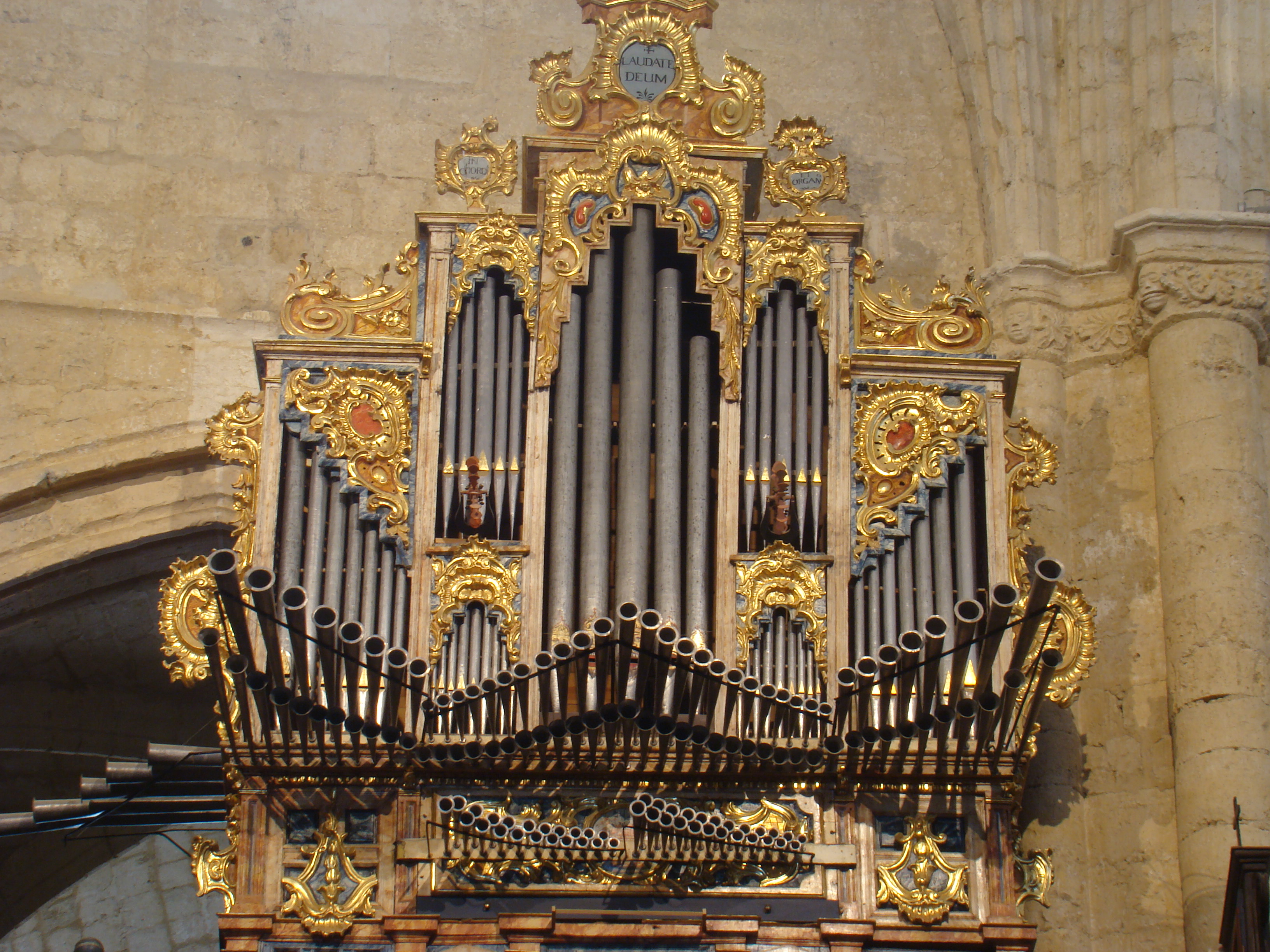 Iglesia de San Hipólito en Támara de Campos (Palencia, España). Detalle del órgano construido por Agustín Merino de la Rosa; caja de estilo barroco. Fue restaurado por Federico Acitores, maestro organero de Torquemada (Palencia). Está en uso ofreciendo conciertos durante los meses de julio y agosto.